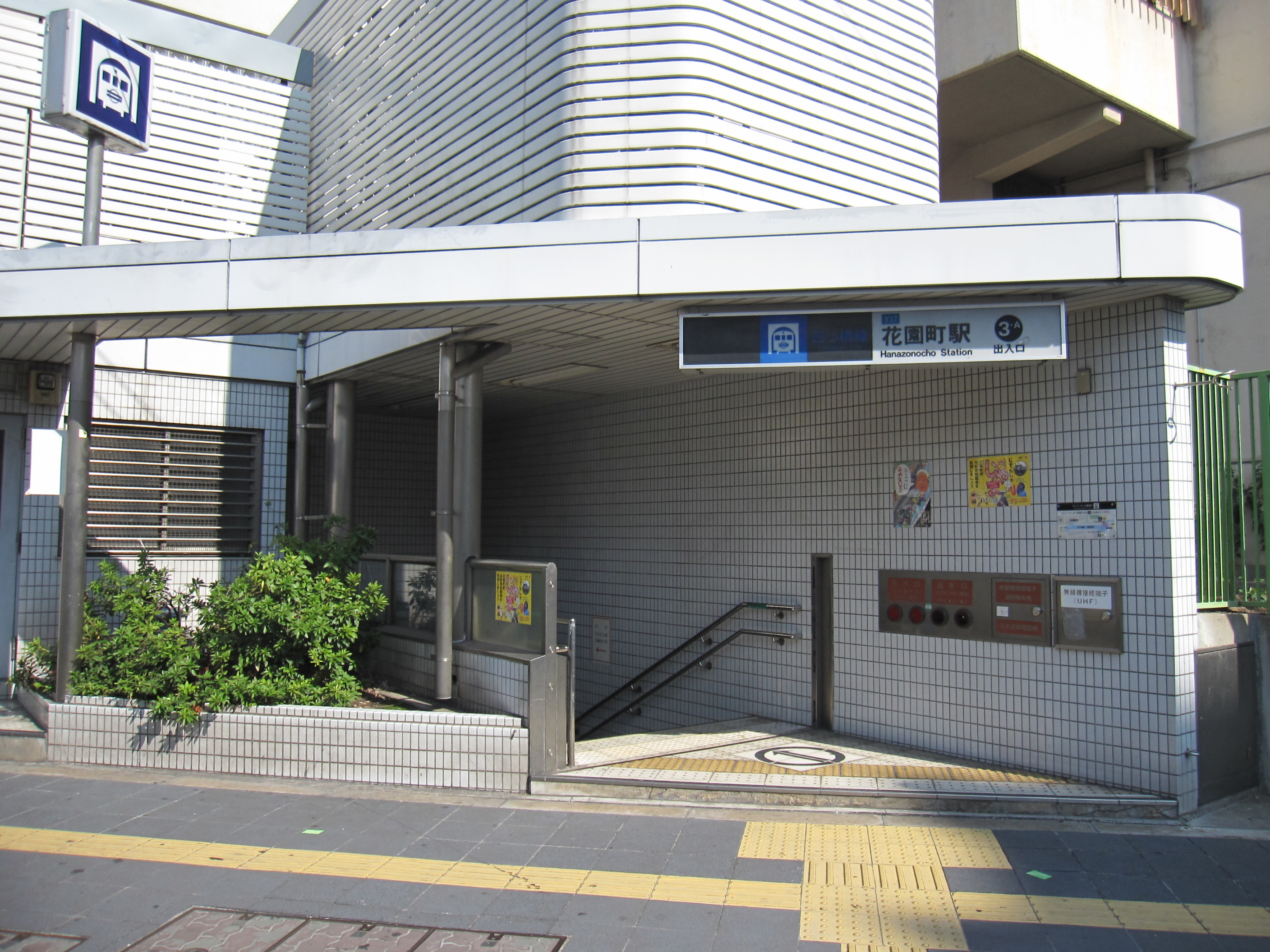 大阪市営地下鉄四つ橋線花園町駅